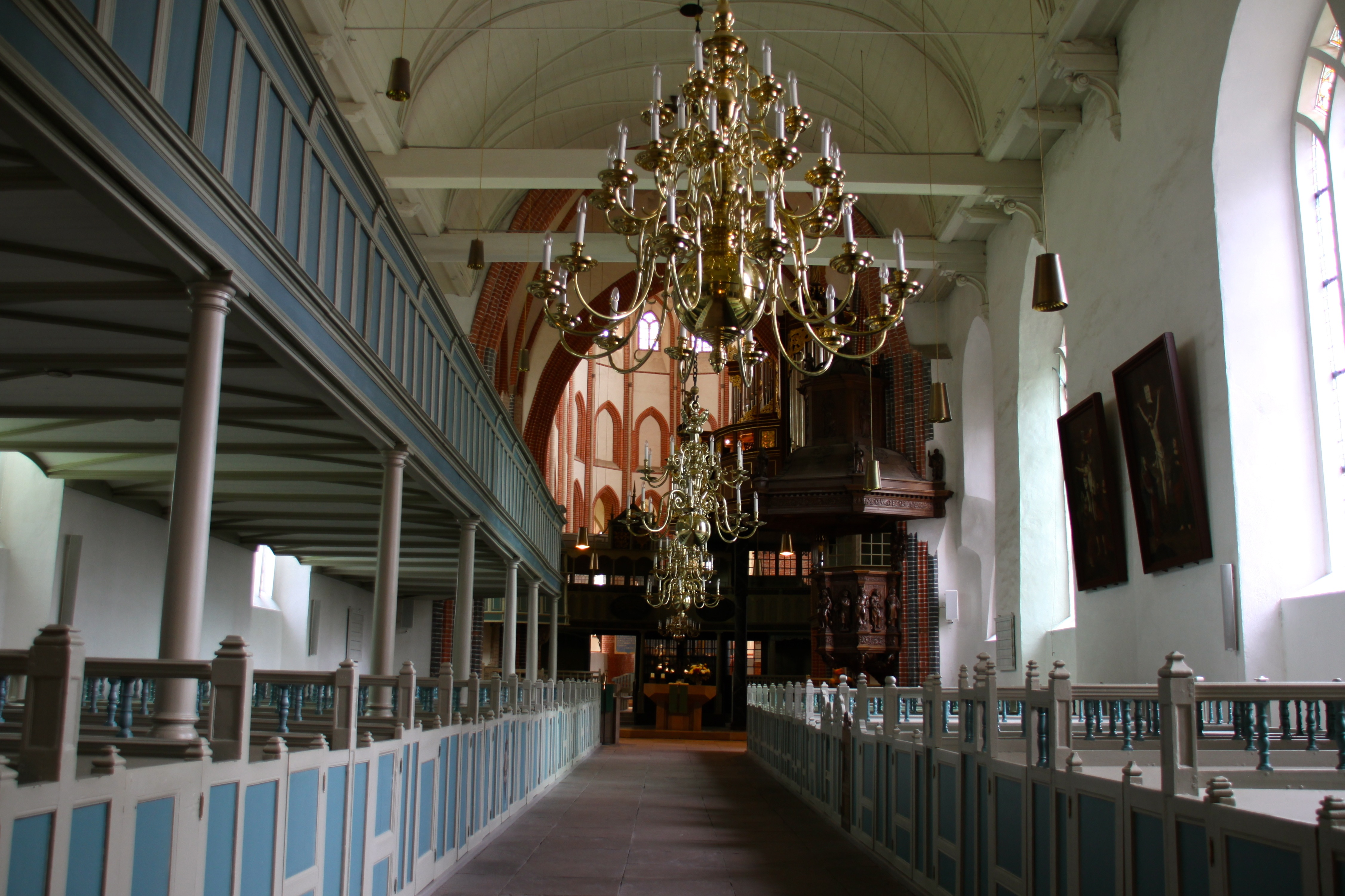 Innenraum der Ludgerikirche